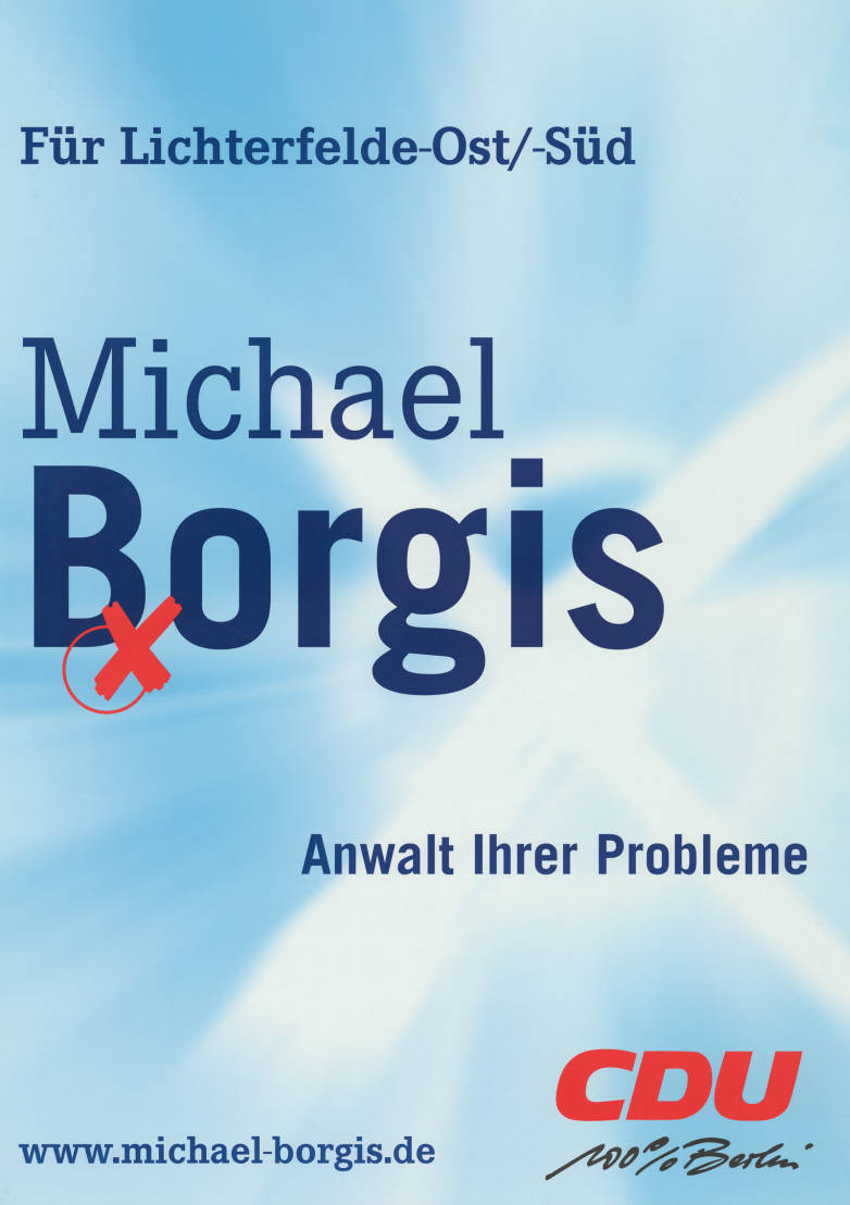 Für Lichterfelde-Ost/-Süd Michael Borgis Anwalt Ihrer Probleme CDU 100% Berlin Abbildung: Stimmkreuz Plakatart: Kandidaten/Personenplakat ohne Objekt-Signatur: 10-004 : 1420 Bestand: Plakate zu Abgeordnetenhauswahlen Berlin (10-004) GliederungBestand10-18: Plakate zu Abgeordnetenhauswahlen Berlin (10-004) » CDU Lizenz: KAS/ACDP 10-004 : 1420 CC-BY-SA 3.0 DE